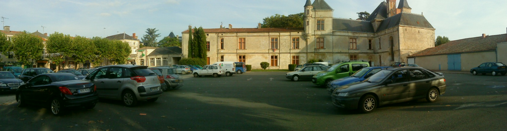 Place du château de Coulonges sur l'Autize, en 2010, où on y voit le château Renaissance construit au XVIème siècle